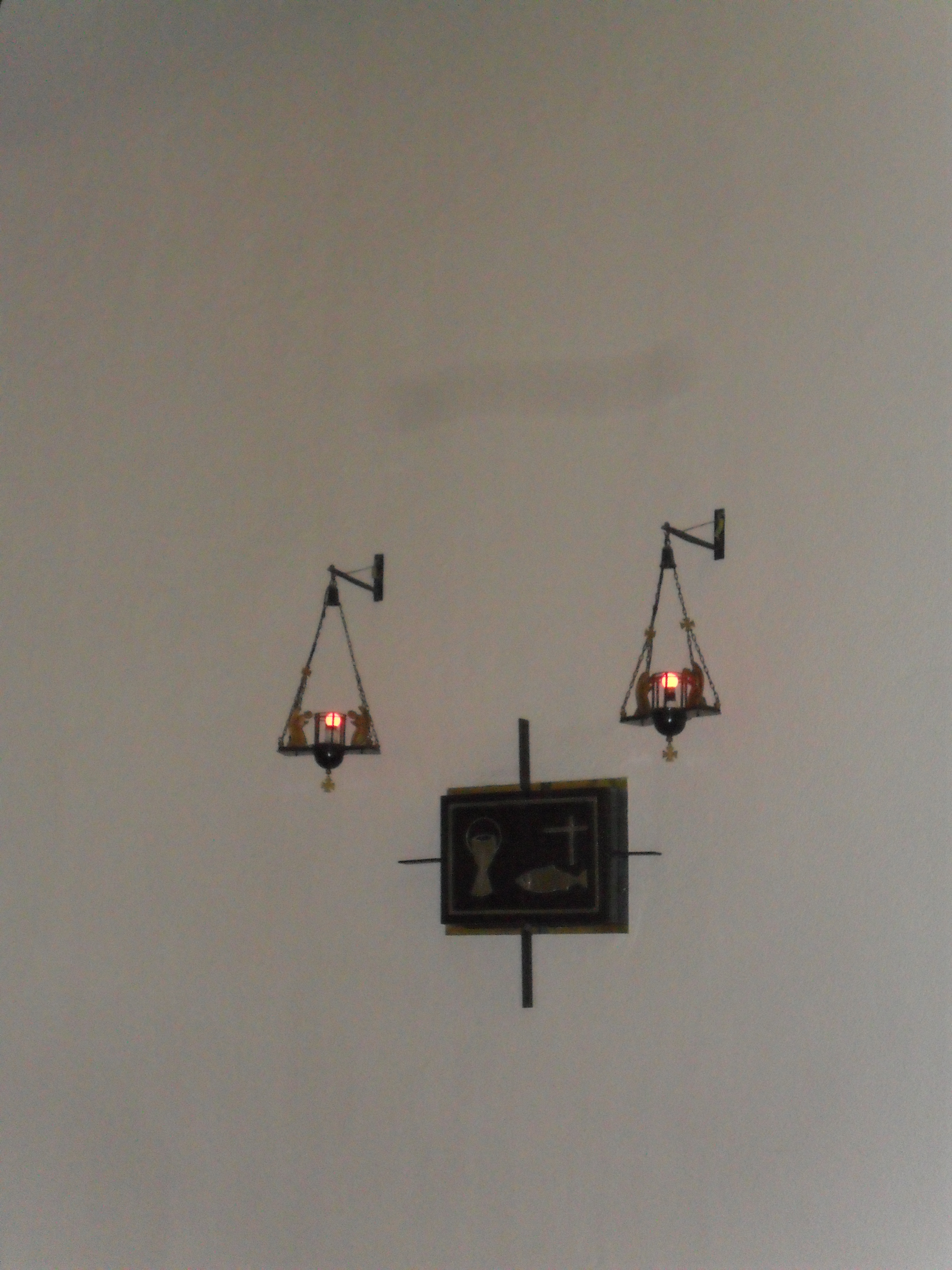 中文（香港）: 聖老楞佐堂, 香港, 中國